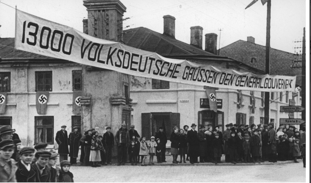 Mieszkańcy Tomaszowa Mazowieckiego w oczekiwaniu na przyjazd Hansa Franka. Widoczna ludność na ulicy miasta i rozwieszony transparent z napisem "13 000 volksdeutschów pozdrawia generalnego gubernatora".